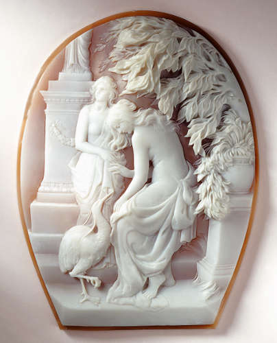 "L'Amore immortale" incisione su conchiglia sardonica (Cassis madagascariensis)